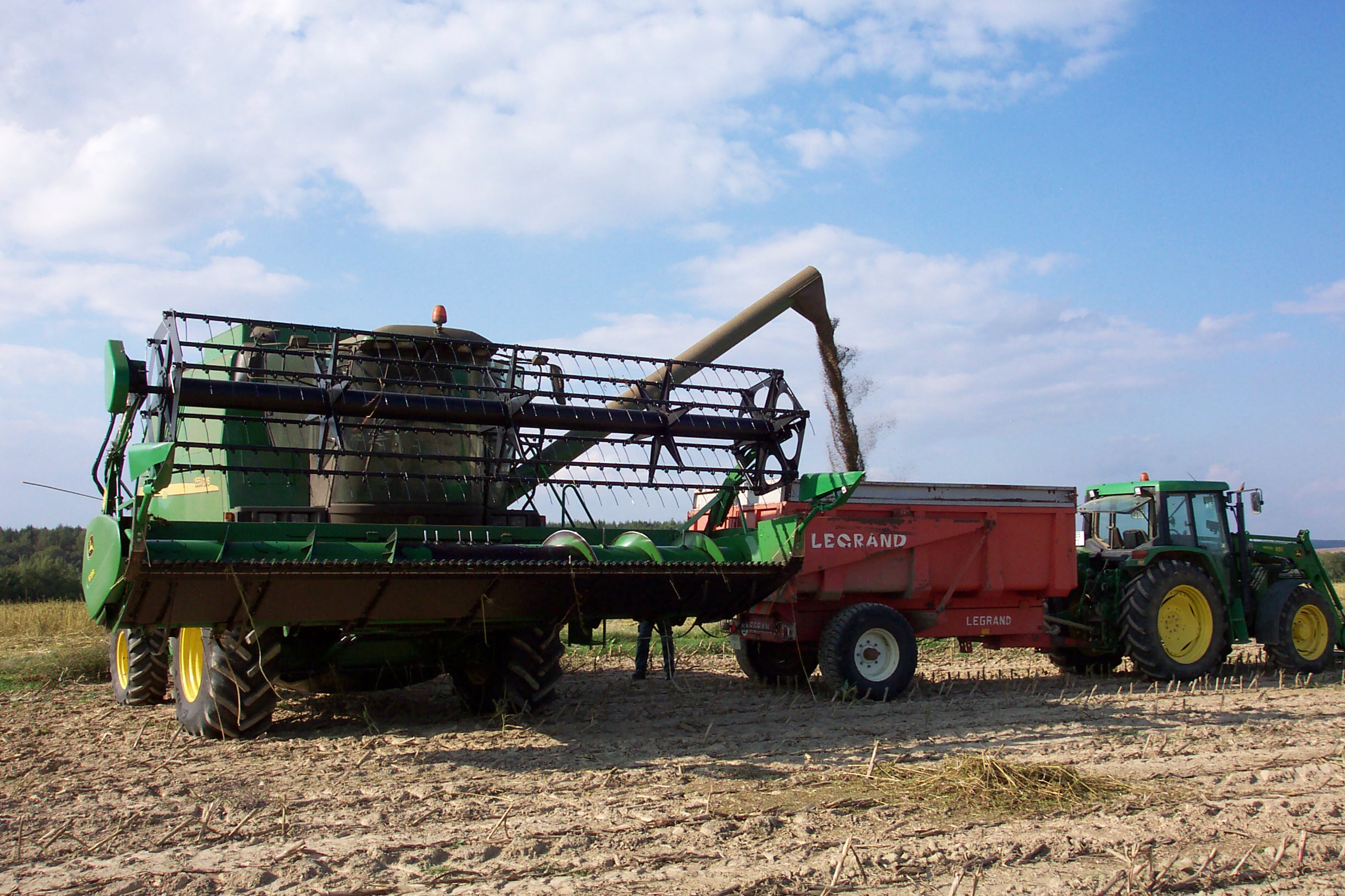 Photo de récolte de chanvre industriel en Haute-Saône (France) en septembre 2004, avec une moissonneuse-batteuse adaptée.